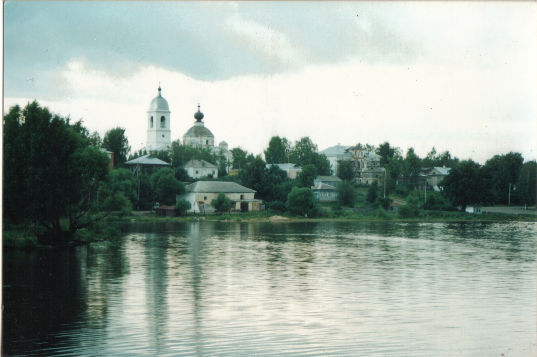 Myschkin - Panorama der Stadt, gemacht von der Fähre über die Wolga